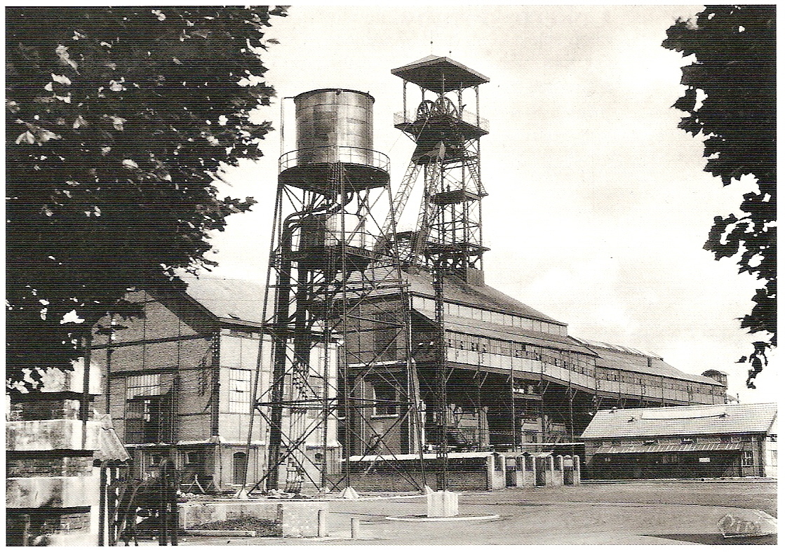 La Fosse n° 10 de la Compagnie des mines de l'Escarpelle était un charbonnage constitué d'un seul puits situé à Leforest, Pas-de-Calais, Nord-Pas-de-Calais, France.